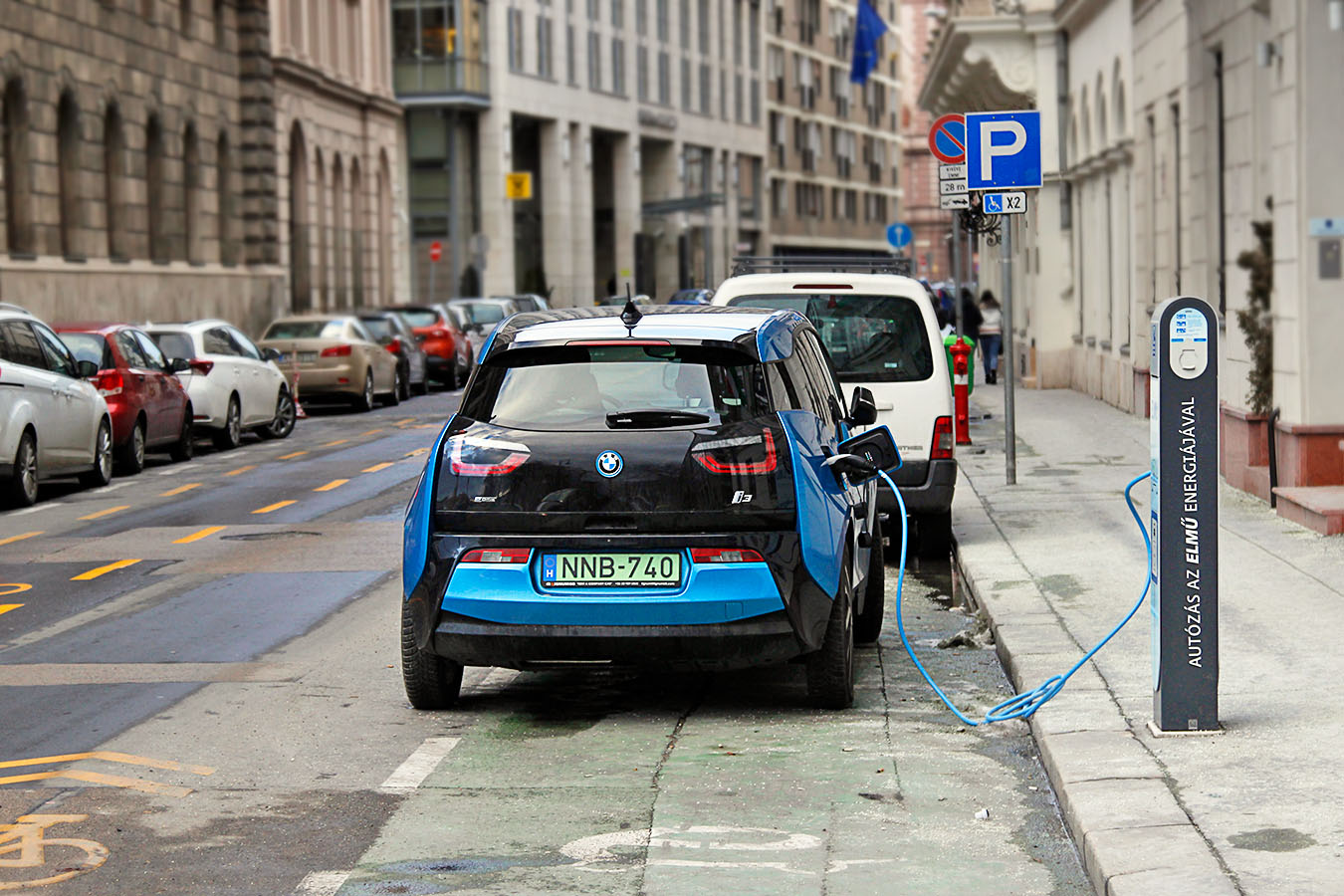 Budapest, Hungary